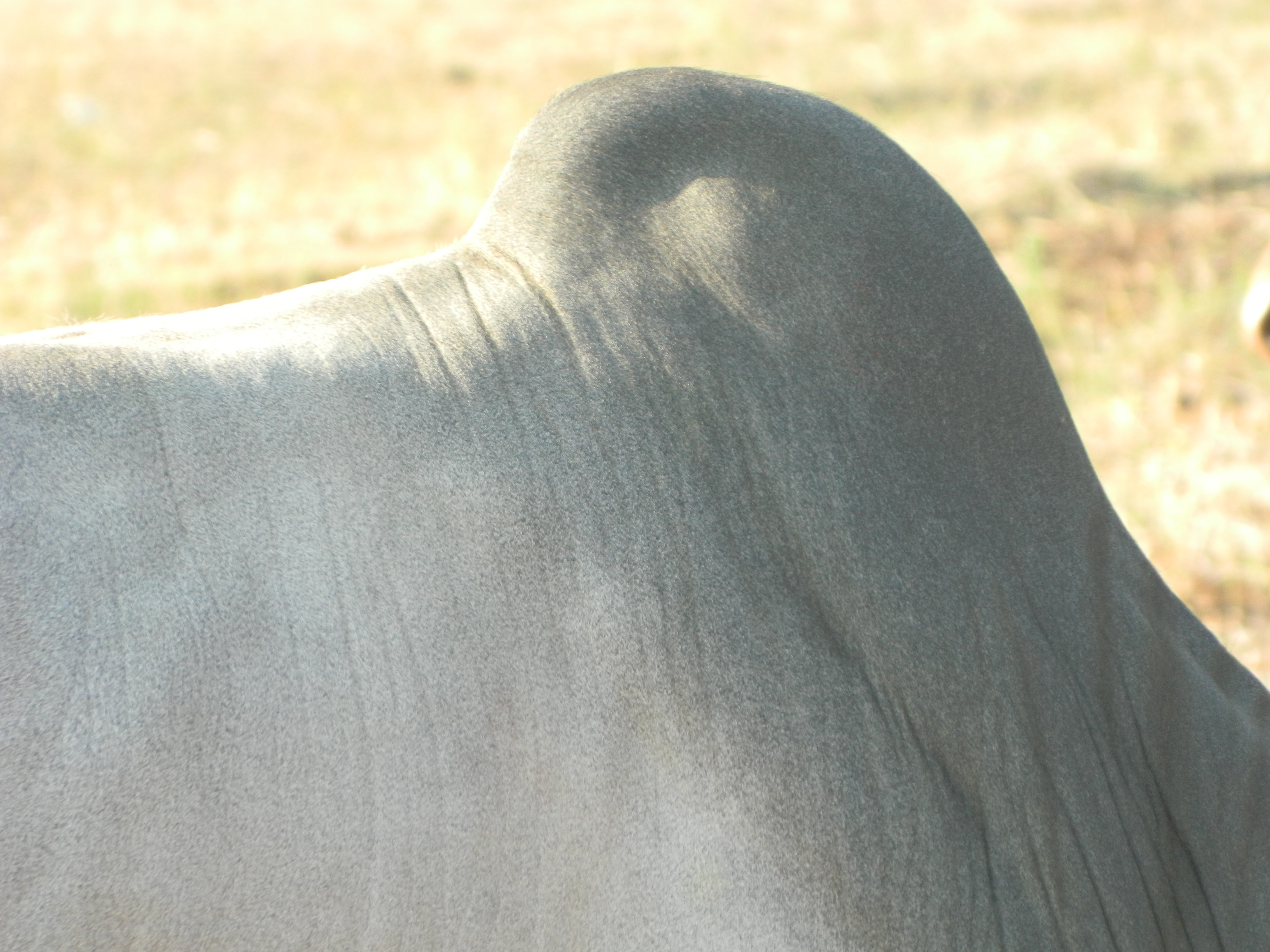 திமில்Unknown a hump